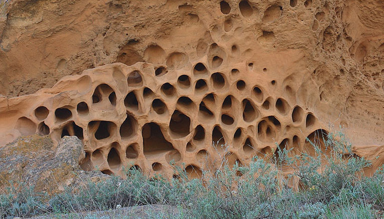 "Поющие скалы", гора Большое Богдо, Ахтубинсий район, Астраханская область, Богдинско-Баскунчакский заповедник